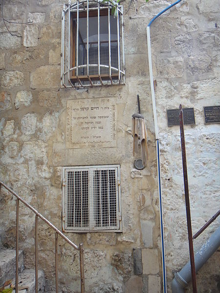 בית הצלם